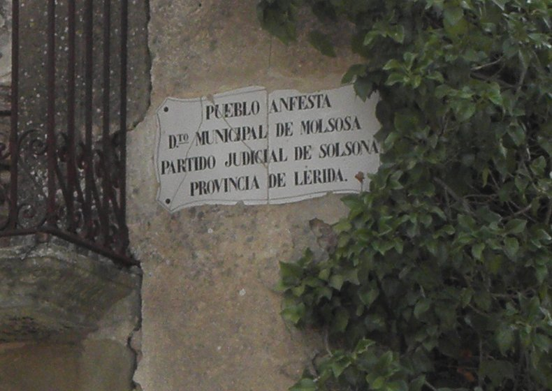 Enfesta (La Molsosa, Solsonès). El rètol on encara es pot llegir la forma Anfesta.